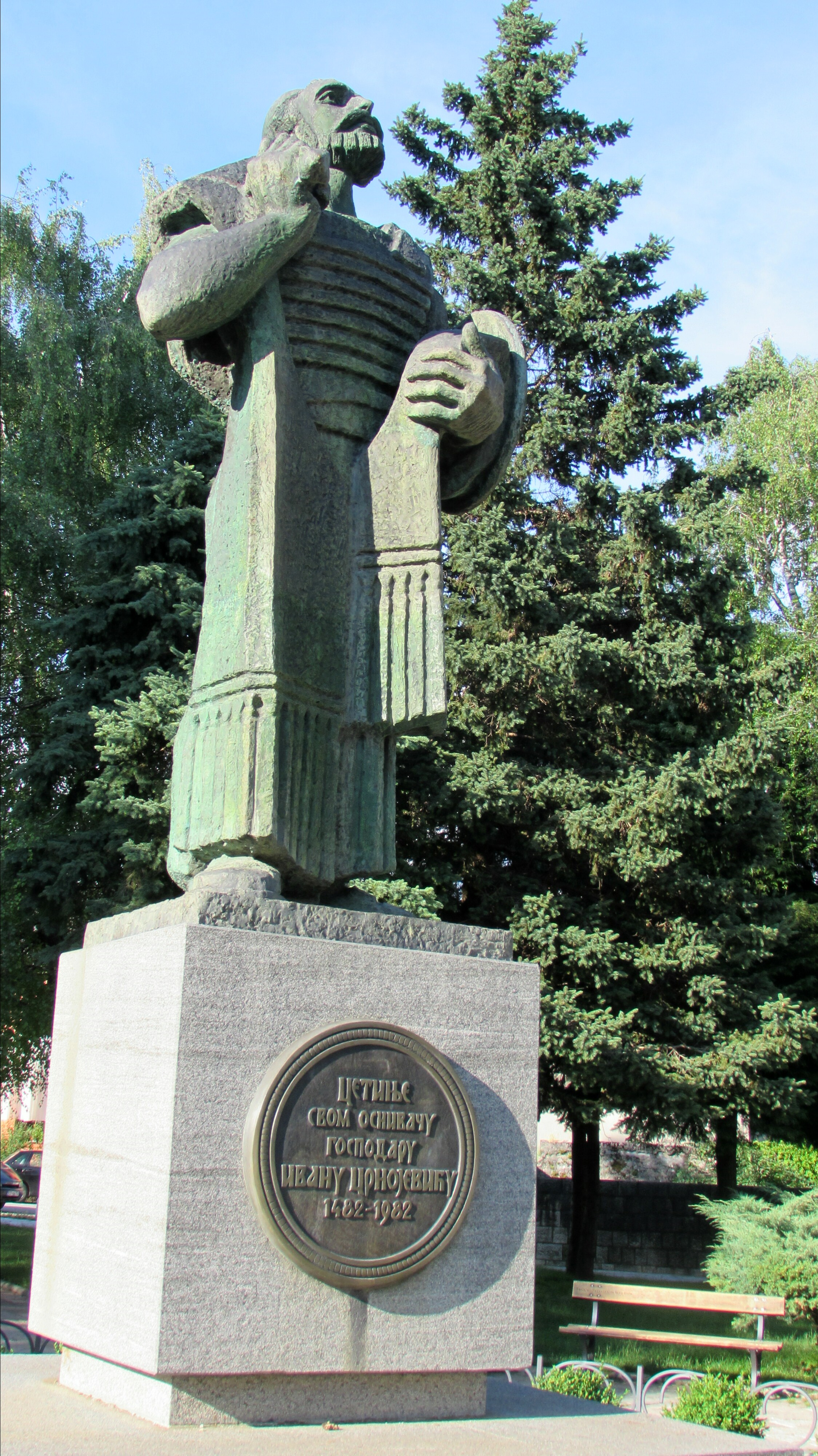 Cetinje Ivan Crnojevic Monument2014